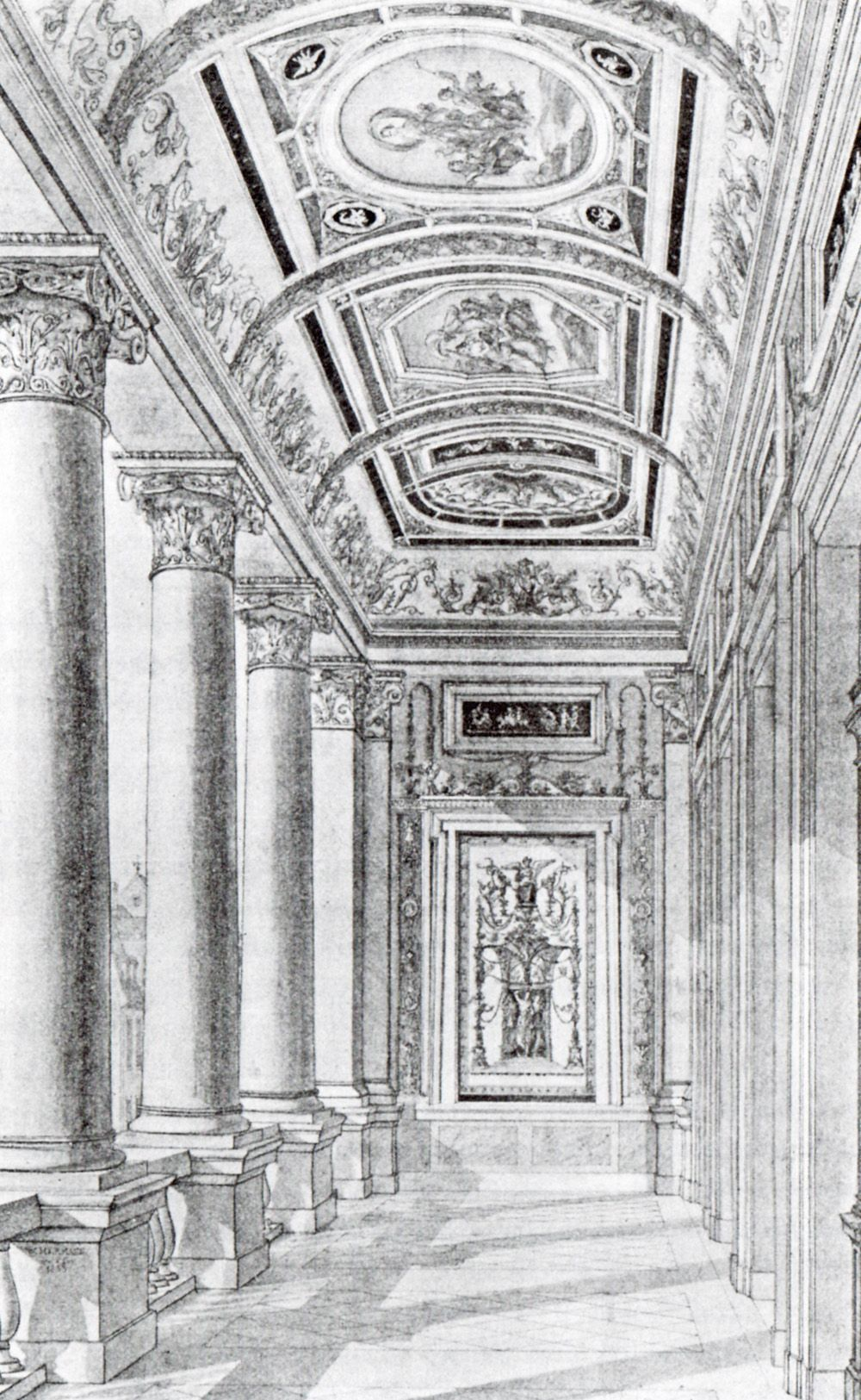 Aquarell der Loggia des Römischen Hauses in Leipzig